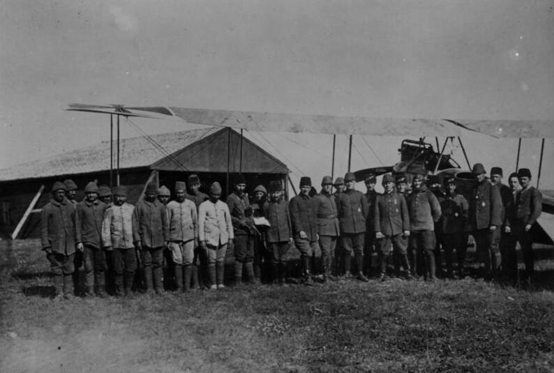 Türkei, Dardanellen, Fliegerabteilung I. Weltkrieg 1914-1918 Orientalischer Kriegsschauplatz 1915: Eine deutsche Fliegerabteilung in den Dardanellen.